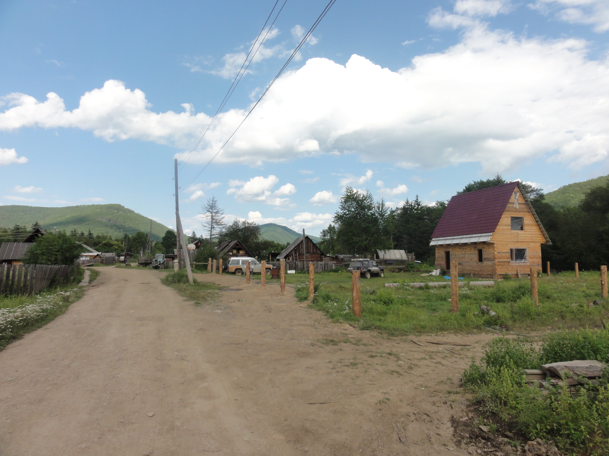 ул. Яблонского в селе Агзу